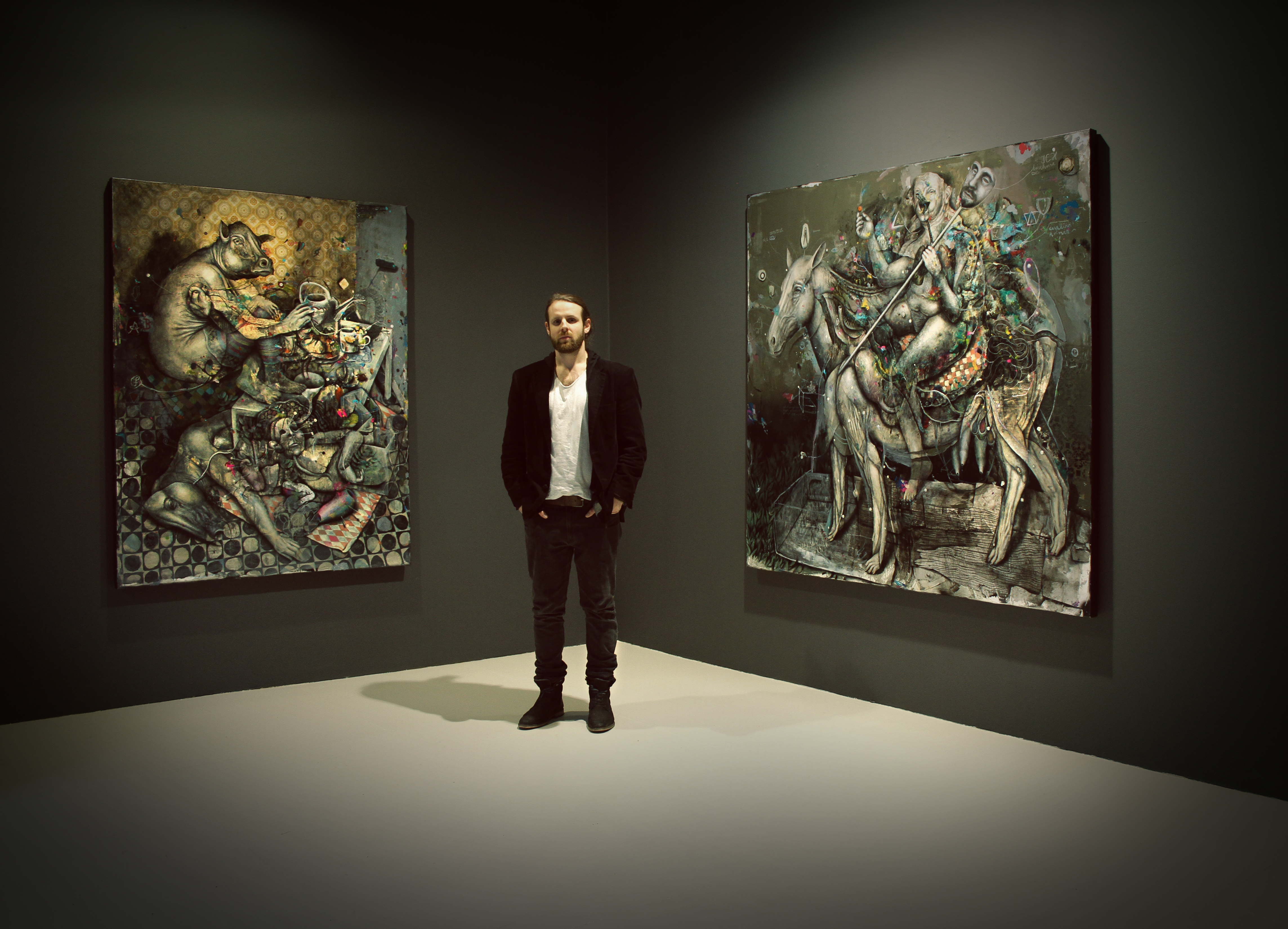 Dominik Schmitt vor zwei Arbeiten, "küche" (links) und "jahreswender" (rechts), in der Janinebeangallery, Berlin 2017